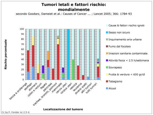 Grafica: Medicina, Epidemiologia, Patologia, Malattie, Oncologia, tumore, cancro; mondiale; Fattori rischio: Alcool, Tabagismo, Frutta & verdura scarsa, Sovrapeso, Attività fisica scarsa, Iniezioni sanitarie contaminate, Fumo dal focolaio, Inquinamento aria urbana, Sesso non sicuro; Tumori: bocca e orofaringe, esofago, stomaco, colon e rectum, fegato, pancreas, trachea, bronchi, polmoni, mammelle, cervix uteri, corpus uteri, vescica, leucemia, altri tumori, tutti tumori.